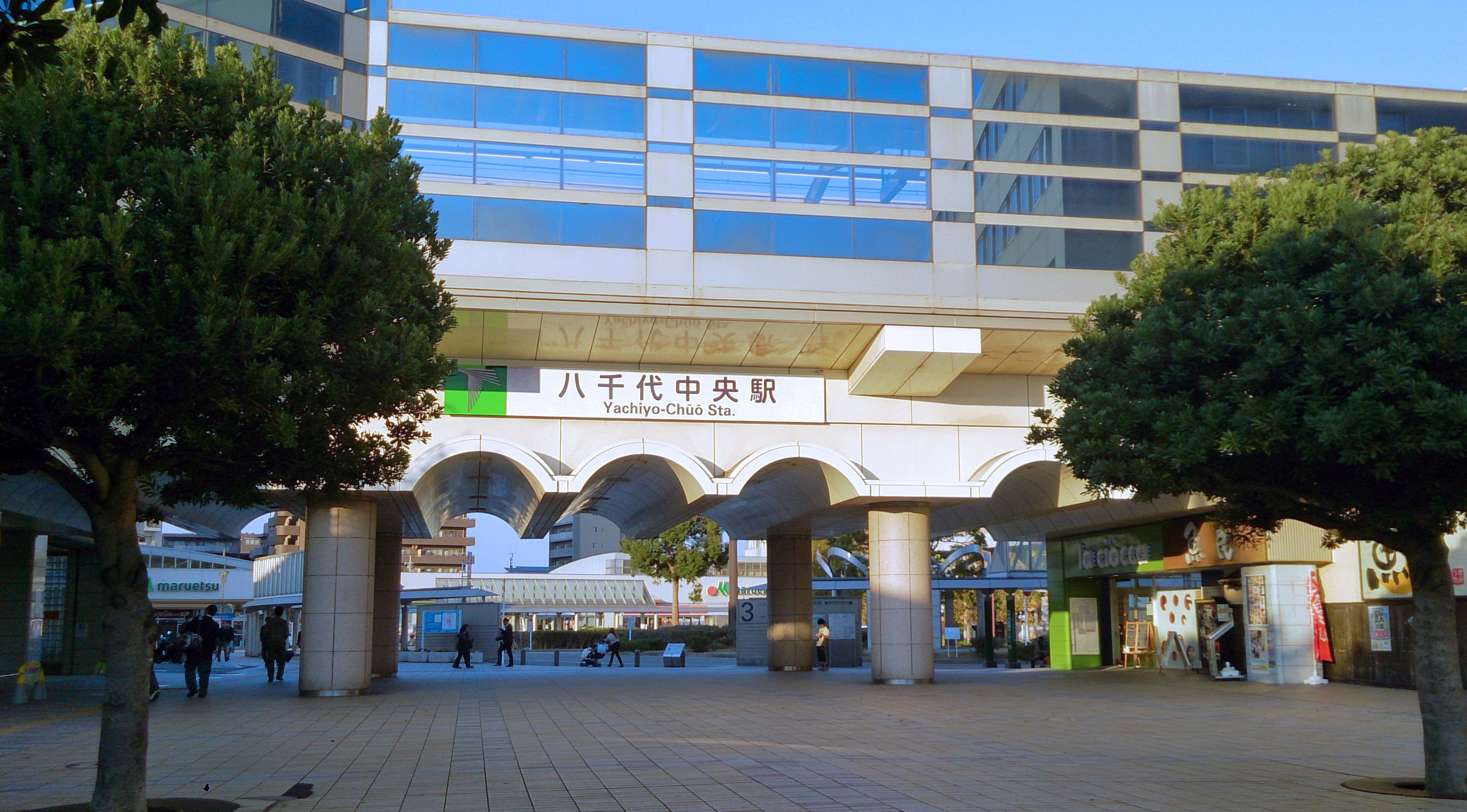 八千代中央駅南口